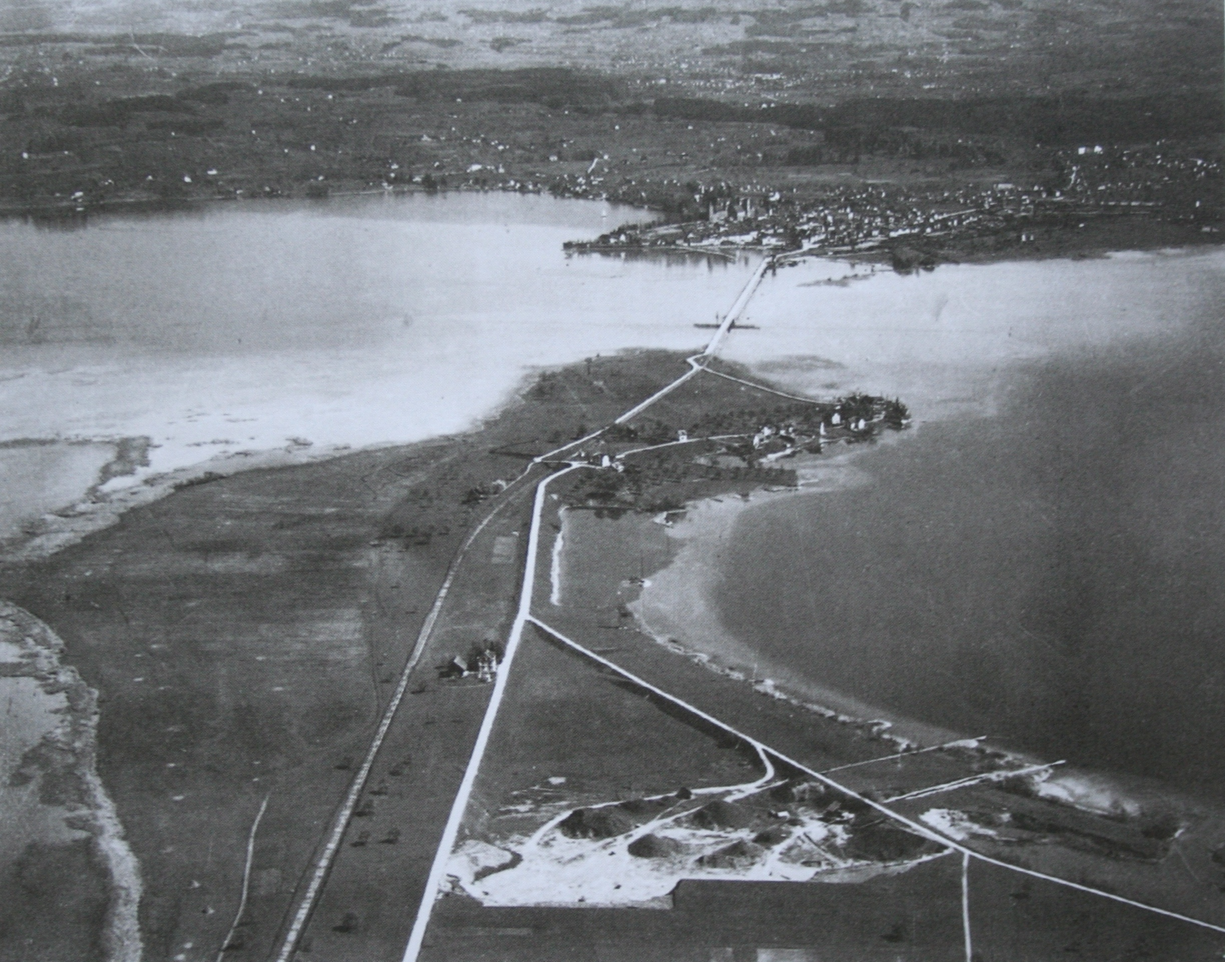 Hurden und Seedamm Rapperswil, 1929, Blick nach Osten, Aufnahme von Walter Mittelholzer (1894 - 1937)